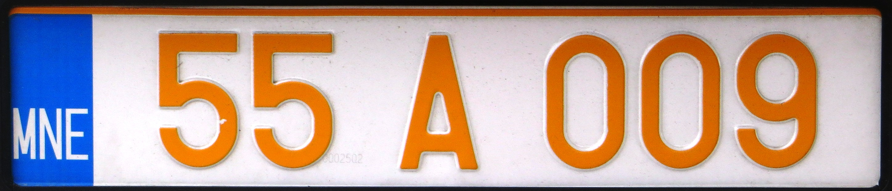 CD plaat van Montenegro